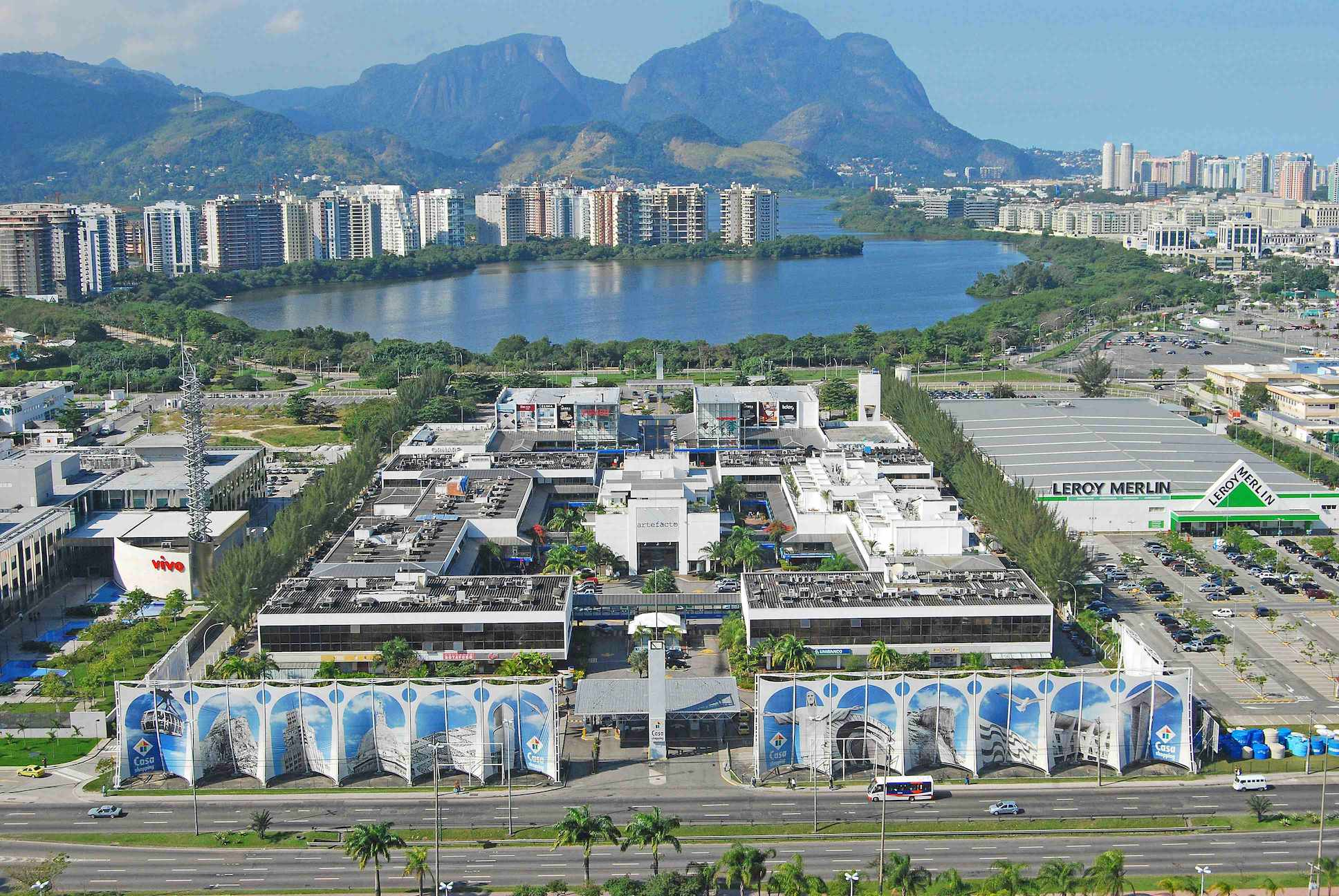 Foto Aerea Vista CasaShopping